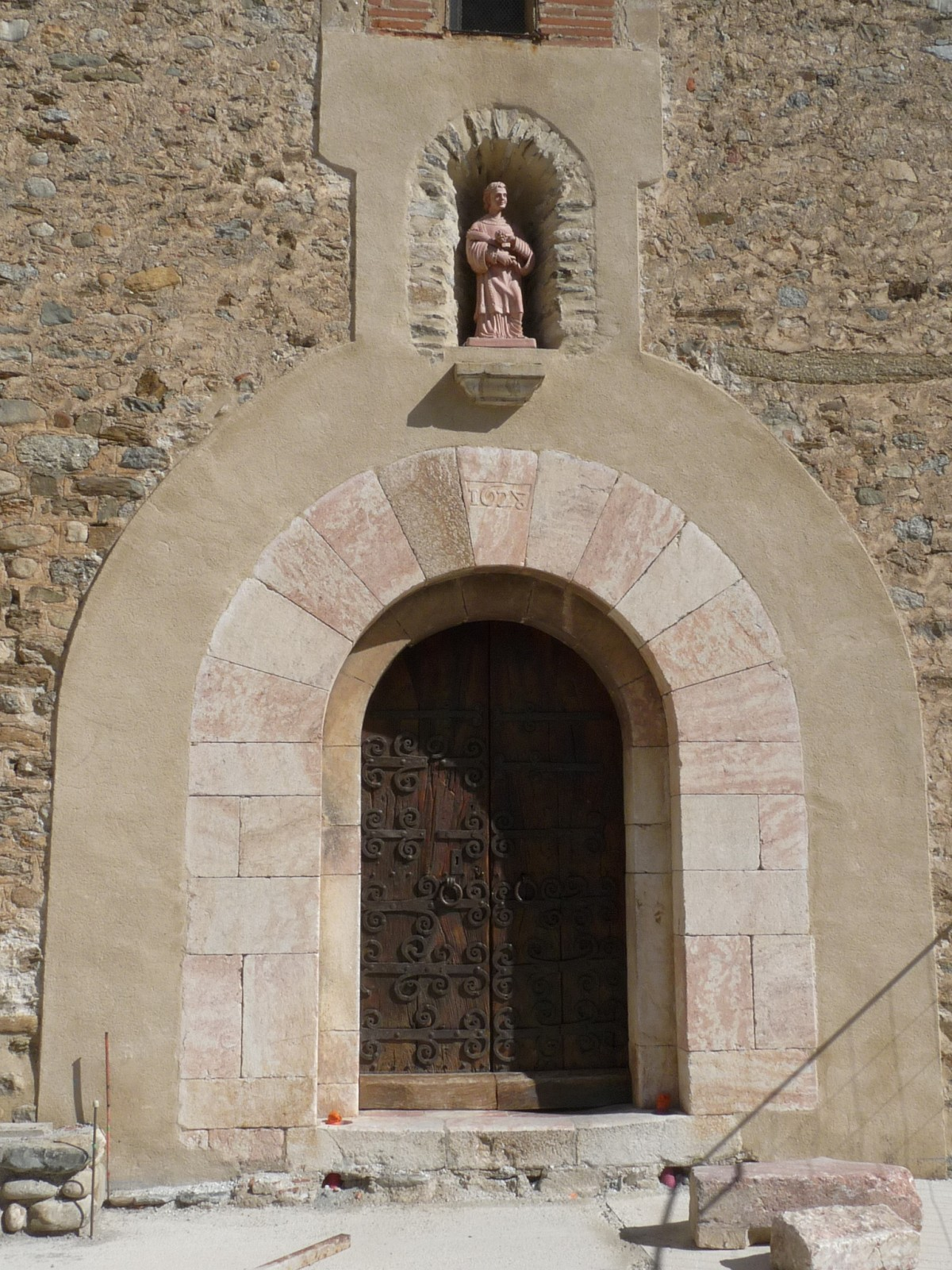 Eglise de Ria, Ria-Sirach, Pyrénées-Orientales, France